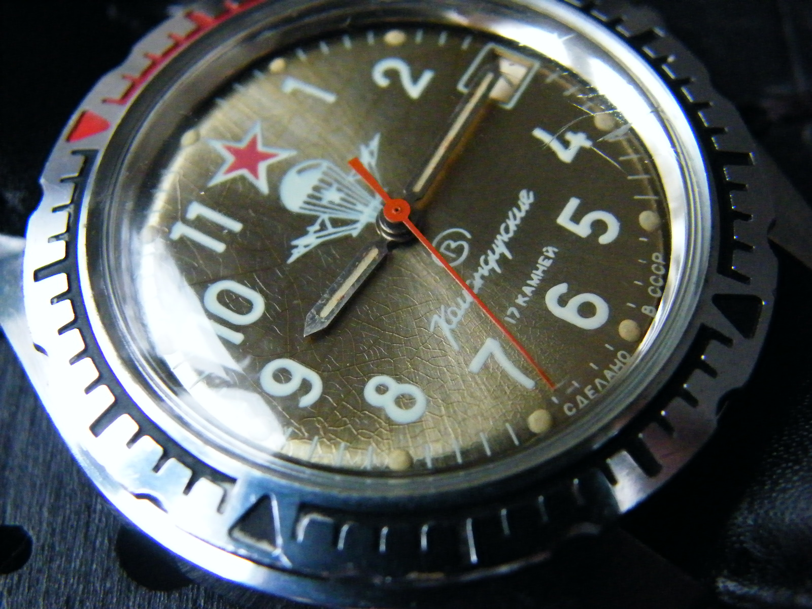 восток командирские Cделано в CCCP